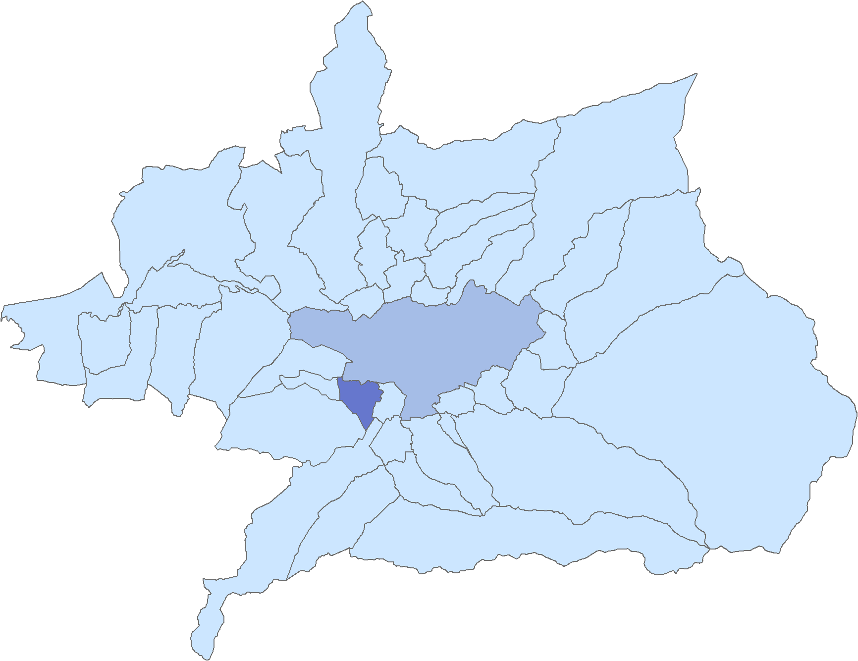 Situación del municipio de Churriana de la Vega respecto a la comarca de la Vega de Granada, en España.